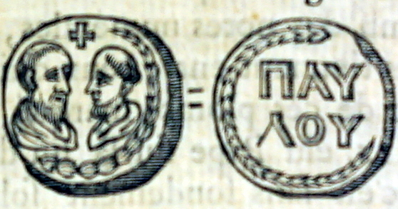 extrait de "Nouveau traité de diplomatique...".